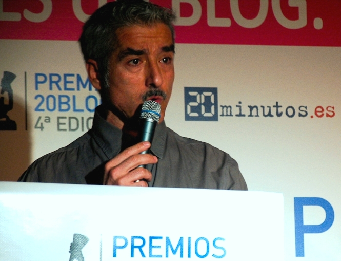 La presentación de los premios corrió a cargo de Serxio Pazos, actor gallego, ex-reportero del programa de televisión "Caiga Quien Caiga".